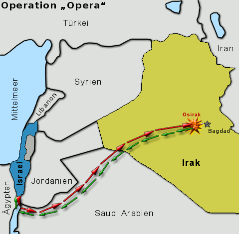 Flugroute der Bomber bei der Mission "Operation Opera" im Jahre 1981